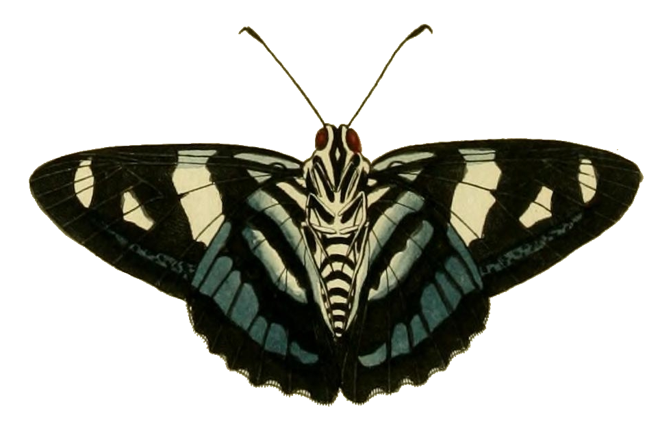 Représentation d'un papillon Jemadia gnetus, vu du dessous.